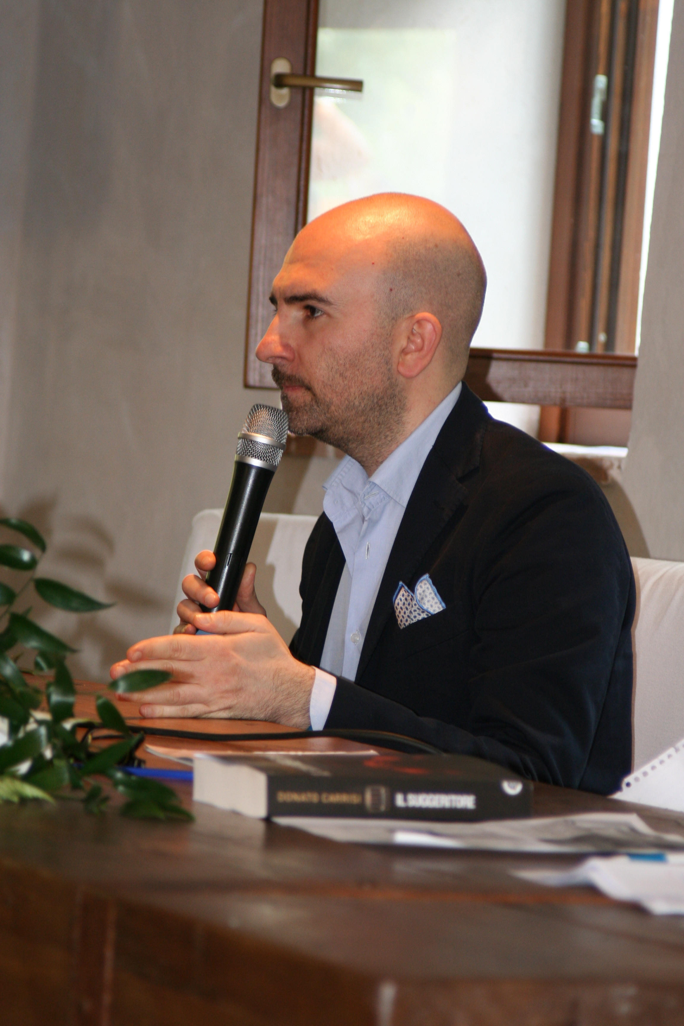 Donato Carrisi durante la presentazione del suo libro: Il Suggeritore, presso la manifestazione 'L'Aquila volta la carta'.